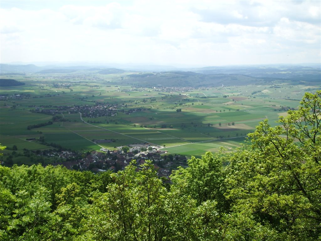 Blick vom Aussichtsturm Siblinger Randen Richtung Westen über das Klettgau. Im Vordergrund liegt Siblingen, dahinter Gächlingen und Hallau. Das Bild habe ich im Juni 2006 selbst gemacht.